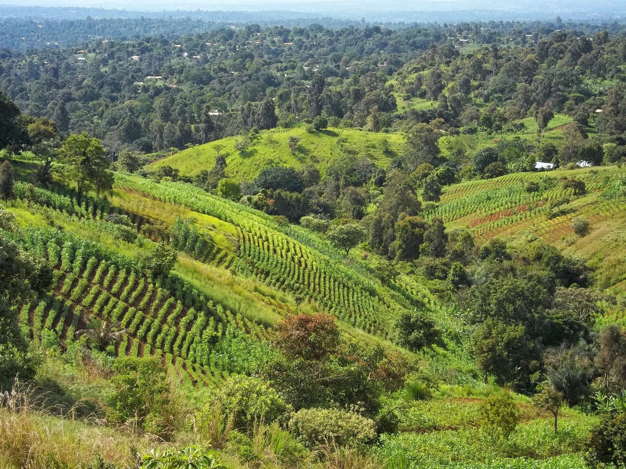 Le relief Bamougong est celui des montagnes